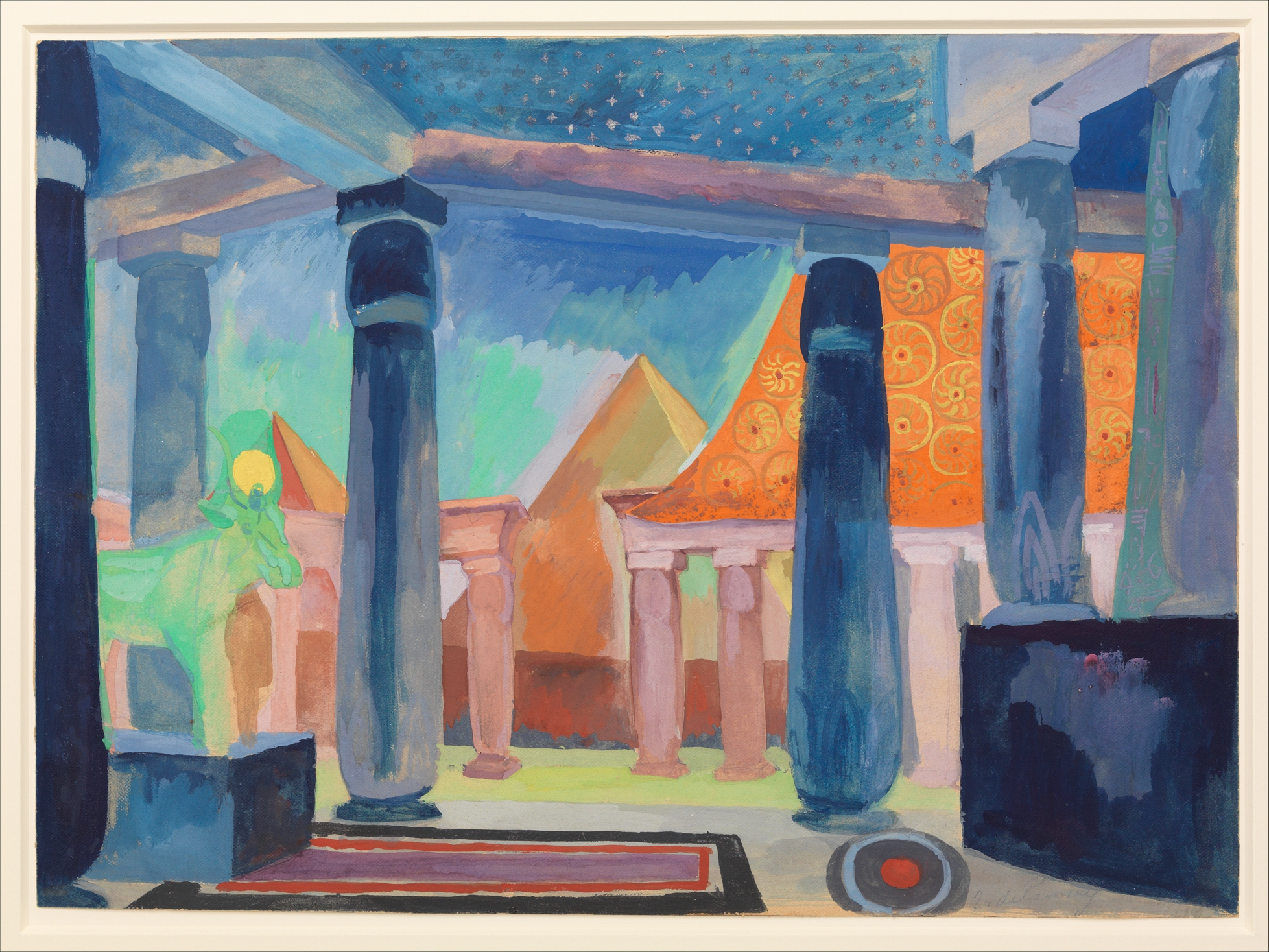 Drawing; Drawings